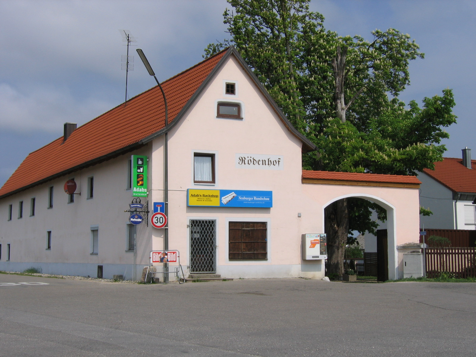 Die Einöde Rödenhof, wie sich heute prräsentiert